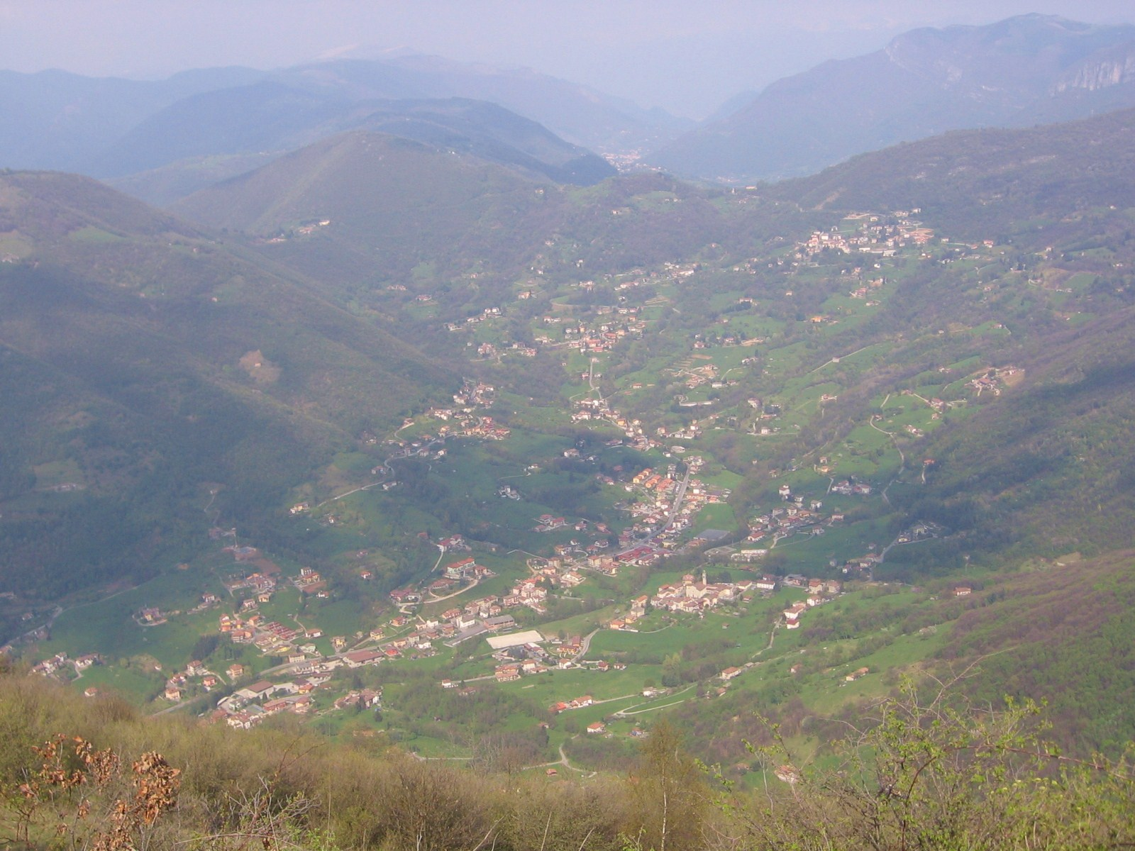 Valle del Lujo, Albino, Bergamo, Italy